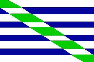 Cataño flag